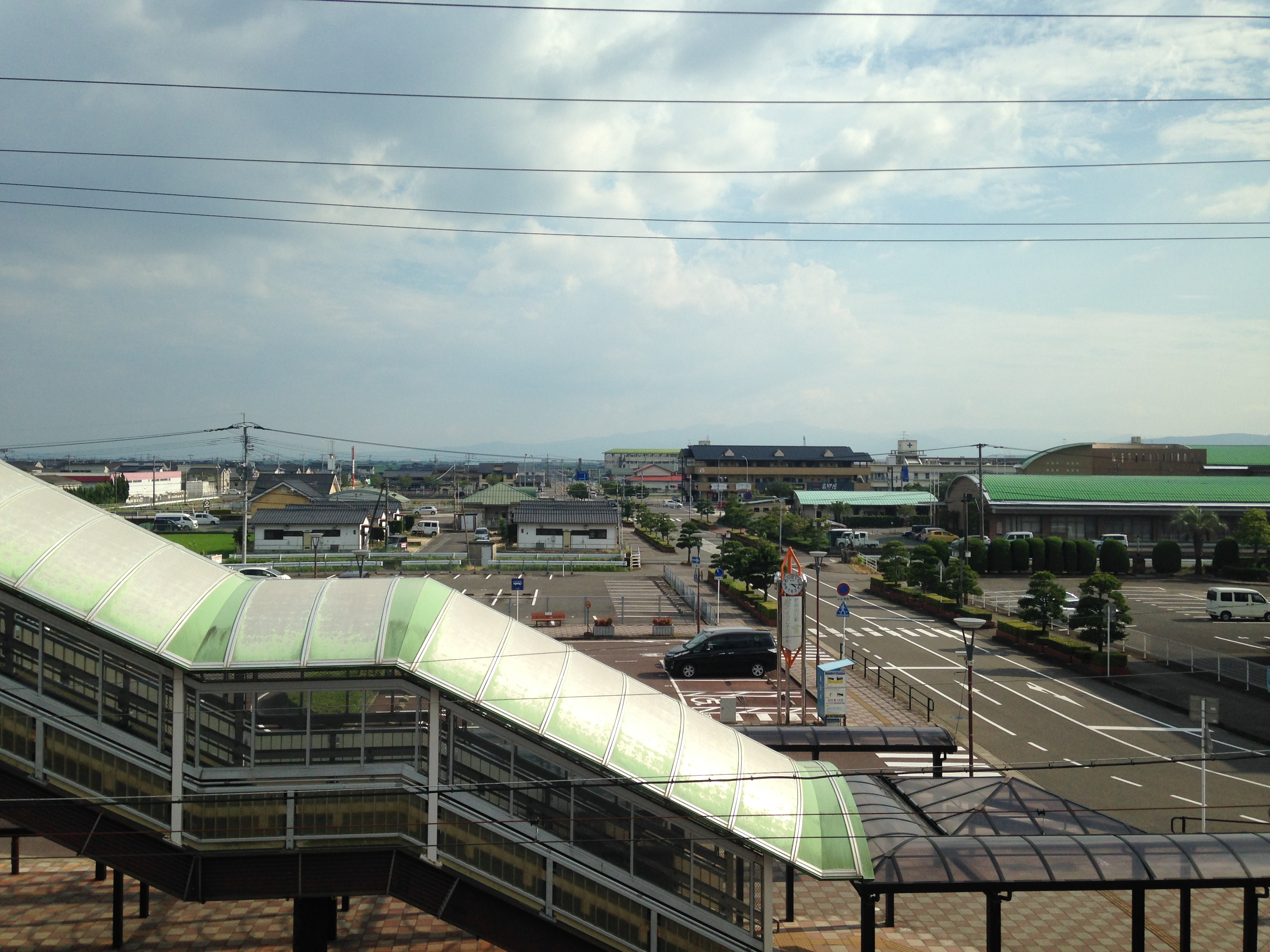 肥前山口駅の跨線橋より望む南側の江北町市街